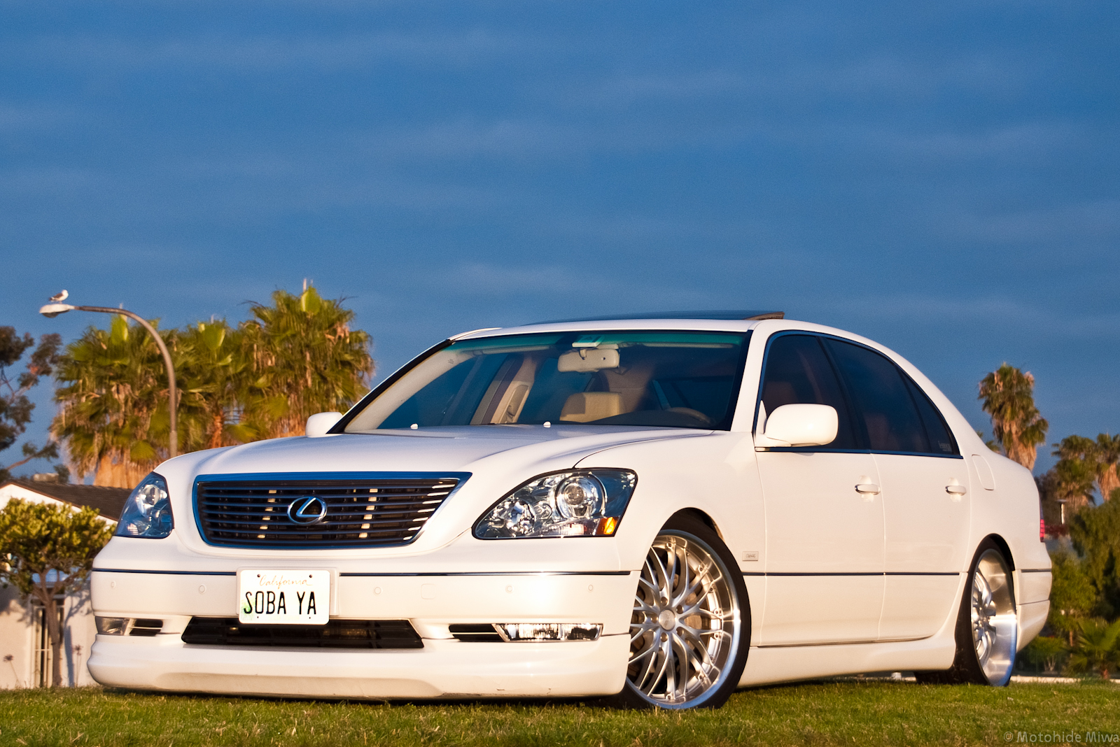 WekFest_Los_Angeles_2010-10-19